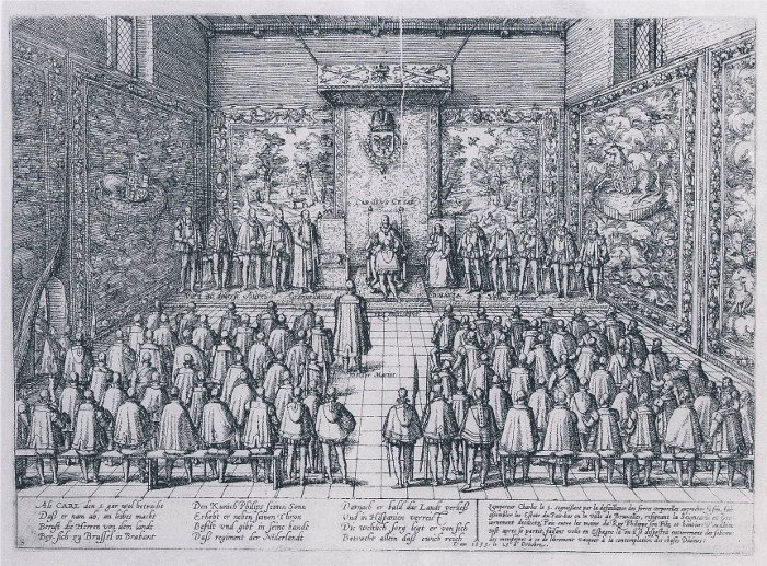 Troonsafstand van Keizer Karel V in de Aula Magna (Brussel), 25 oktober 1555. Ets door Frans Hogenberg. In de troonzaal knielt Filips voor zijn vader. Links Granvelle, rechts Margaretha van Parma en vliesridders. Ten overstaan van de volledige vergadering van de Staten-Generaal, staande voor houten banken met kussens. De muren versierd met wandtapijten. Met onderschrift van 12 regels in het Duits en 5 regels in het Frans. Geschatte datum van vervaardiging is tussen 1566 en 1572 te Keulen.